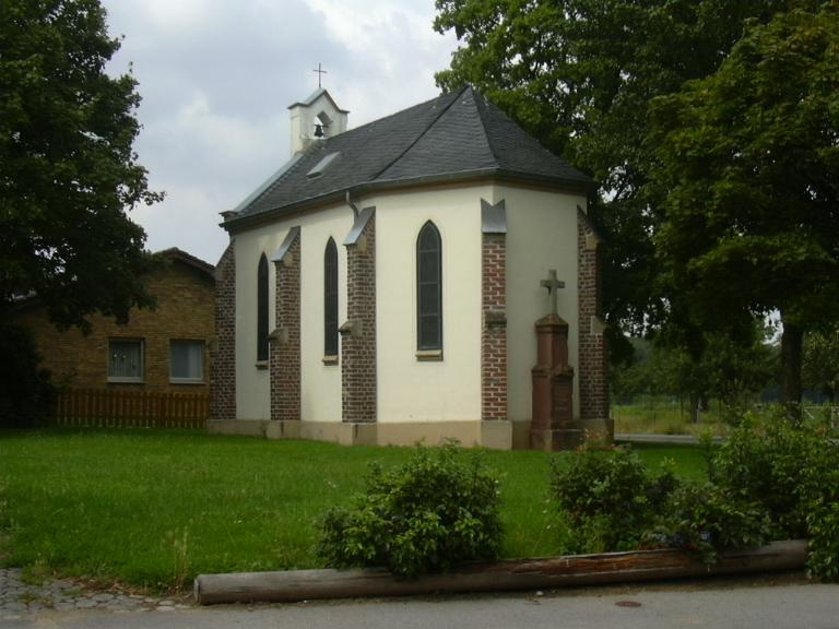 Kirche St. Pankratius (Konzendorf) in Konzendorf own work papa1234 2006-08-04